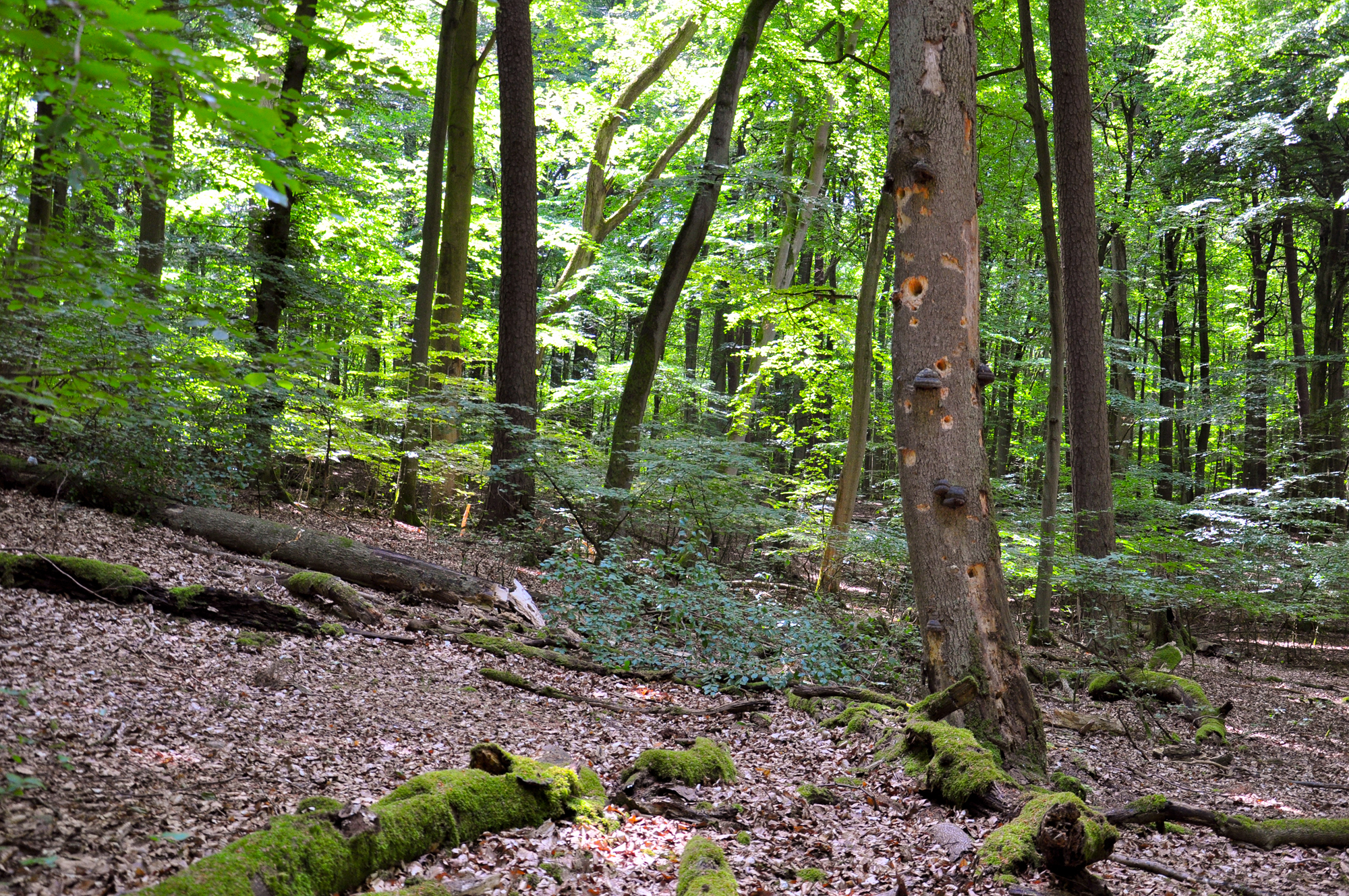 Müritz-Nationalpark, Ostteil Serrahn: Der Altwald Serrahn lässt schon recht gut erahnen, wie Buchenurwälder einst ausgesehen haben.